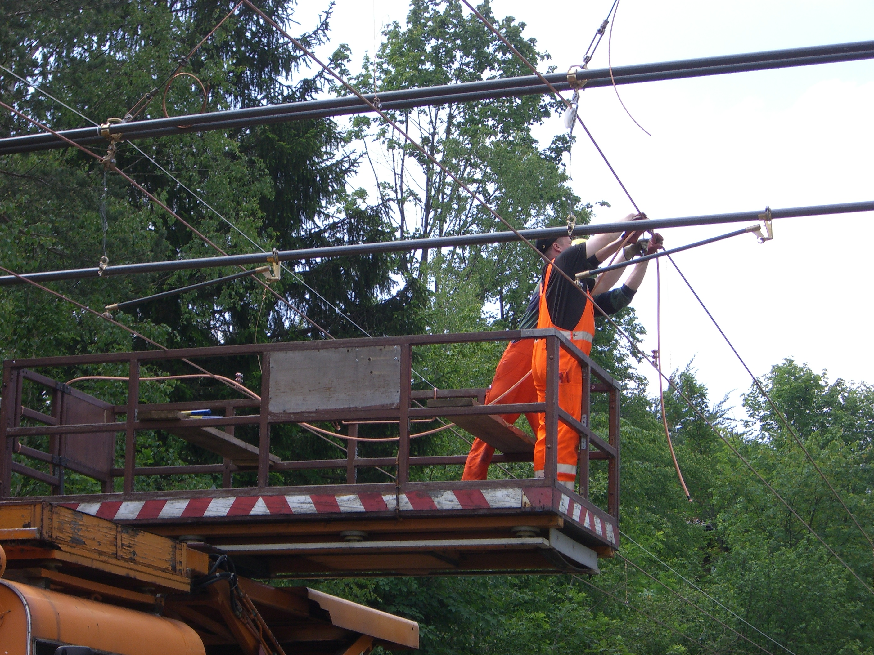 Mercedes Benz-Zweiwegfahrzeug für die Fahrleitungsmontage (Straßenbahn)